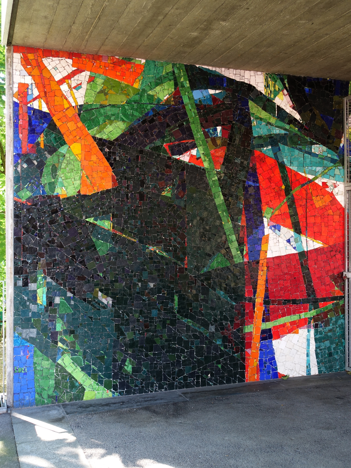 Samuel Buri, geb.1935, Kunstmaler, Glasmosaik, Vas-y, 1961-62. Turnhalle Wirtschaftsgymnasium, St. Jakob Strasse 115, Basel